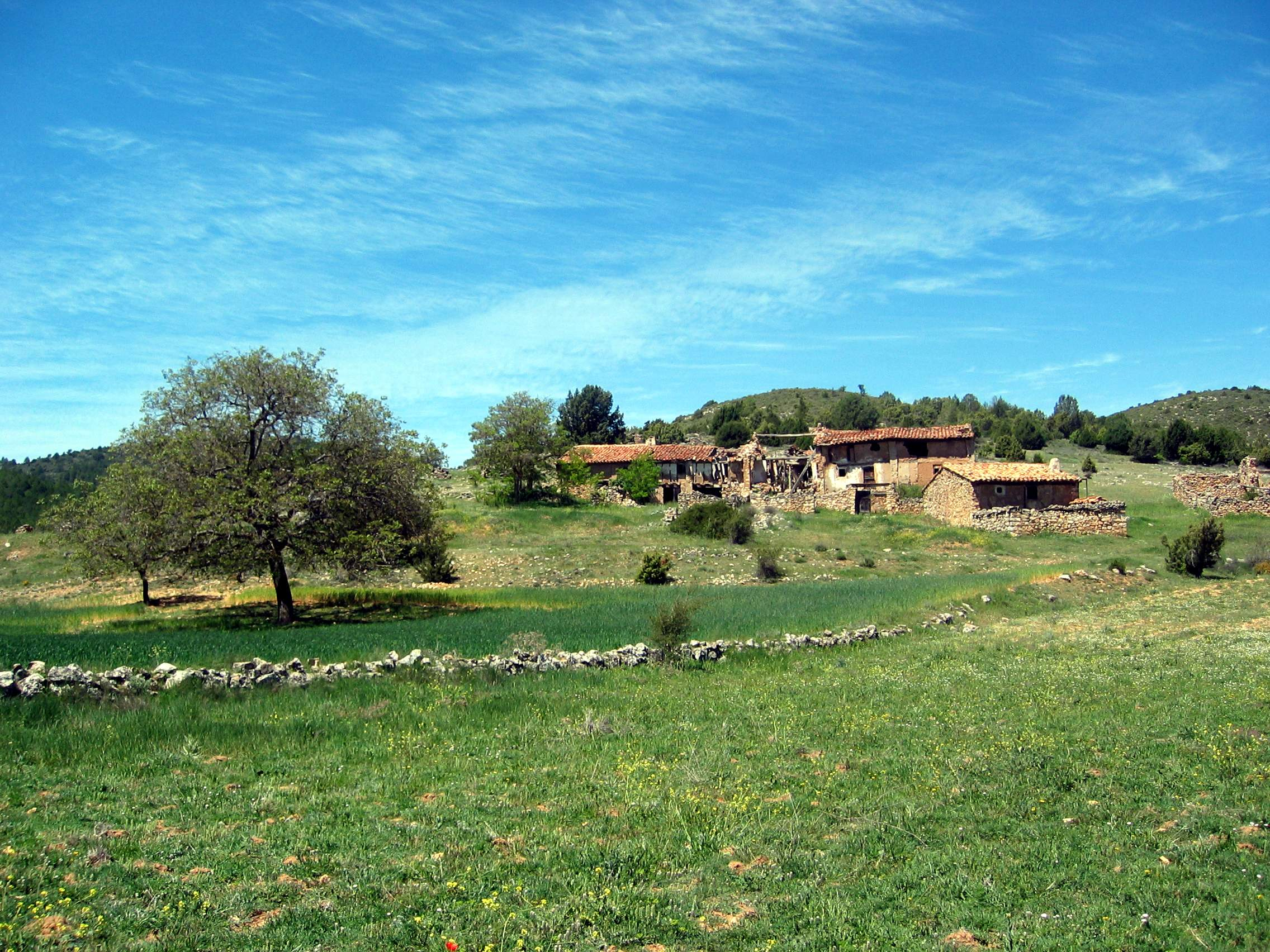 Vista general del caserío de Tóvedas de Arriba, Castielfabib (Valencia).